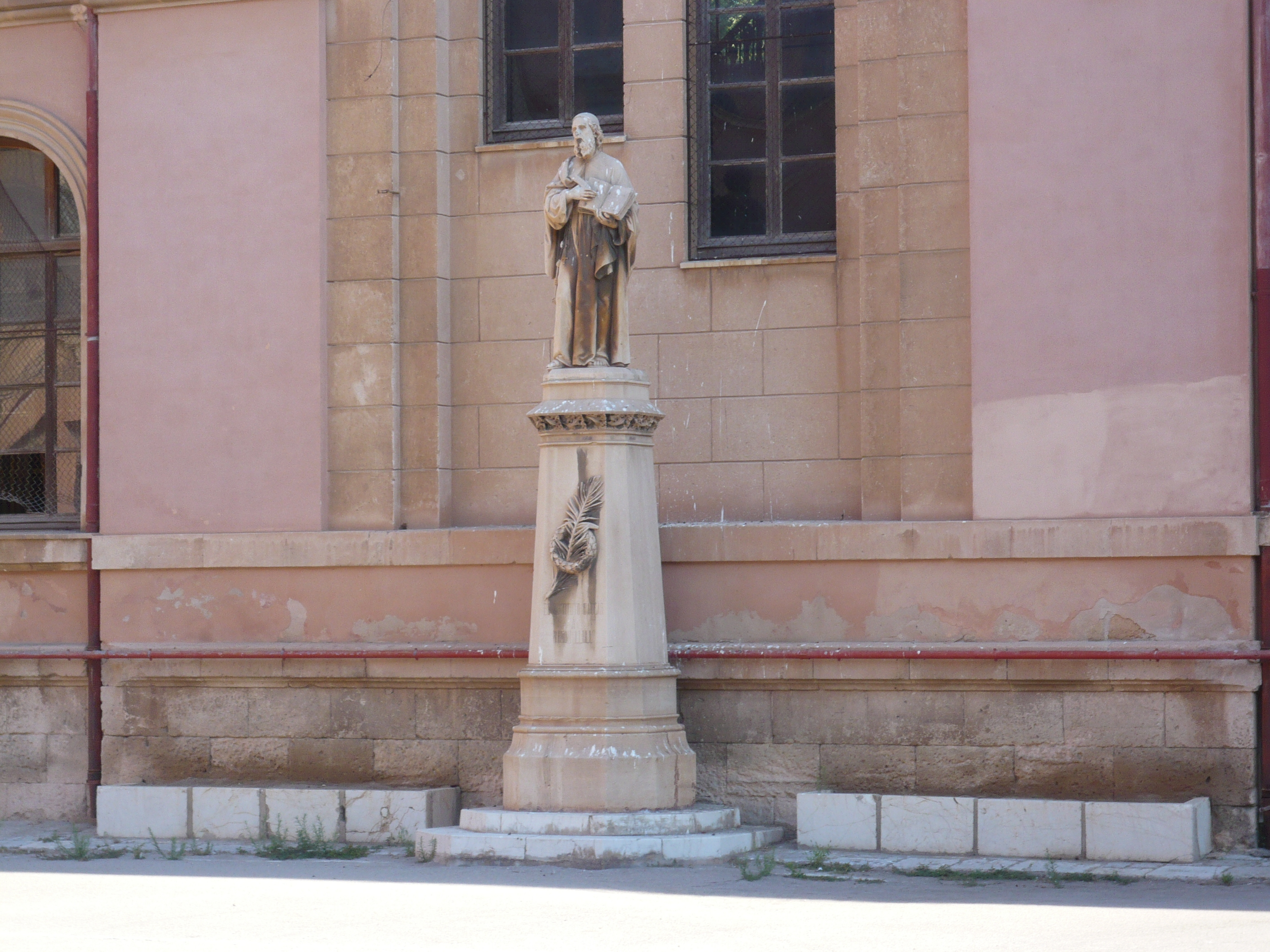 Estàtua de Ramón Llull.